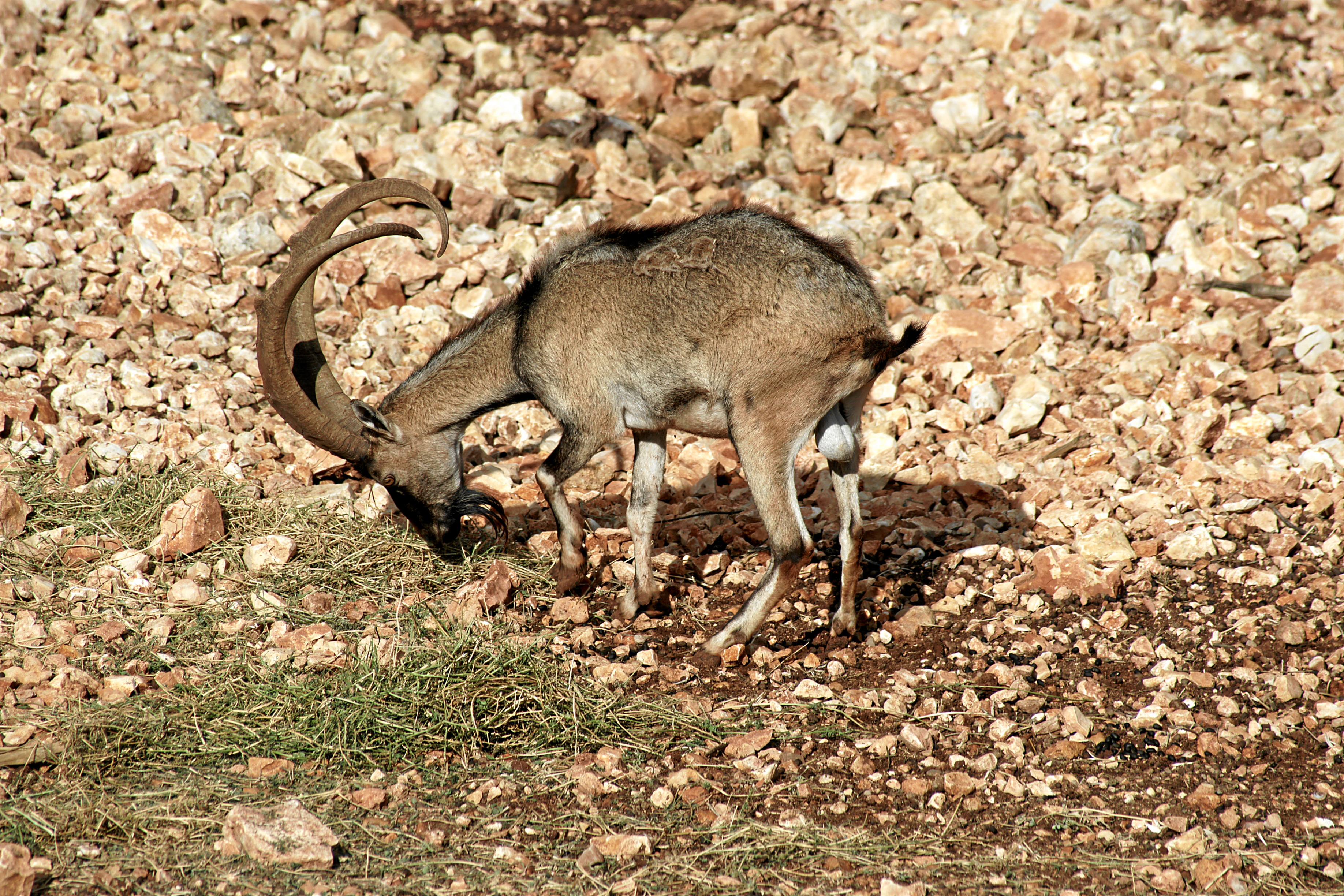 Hai Bar Carmel: kretischer Steinbock (Capra aegagrus creticus)